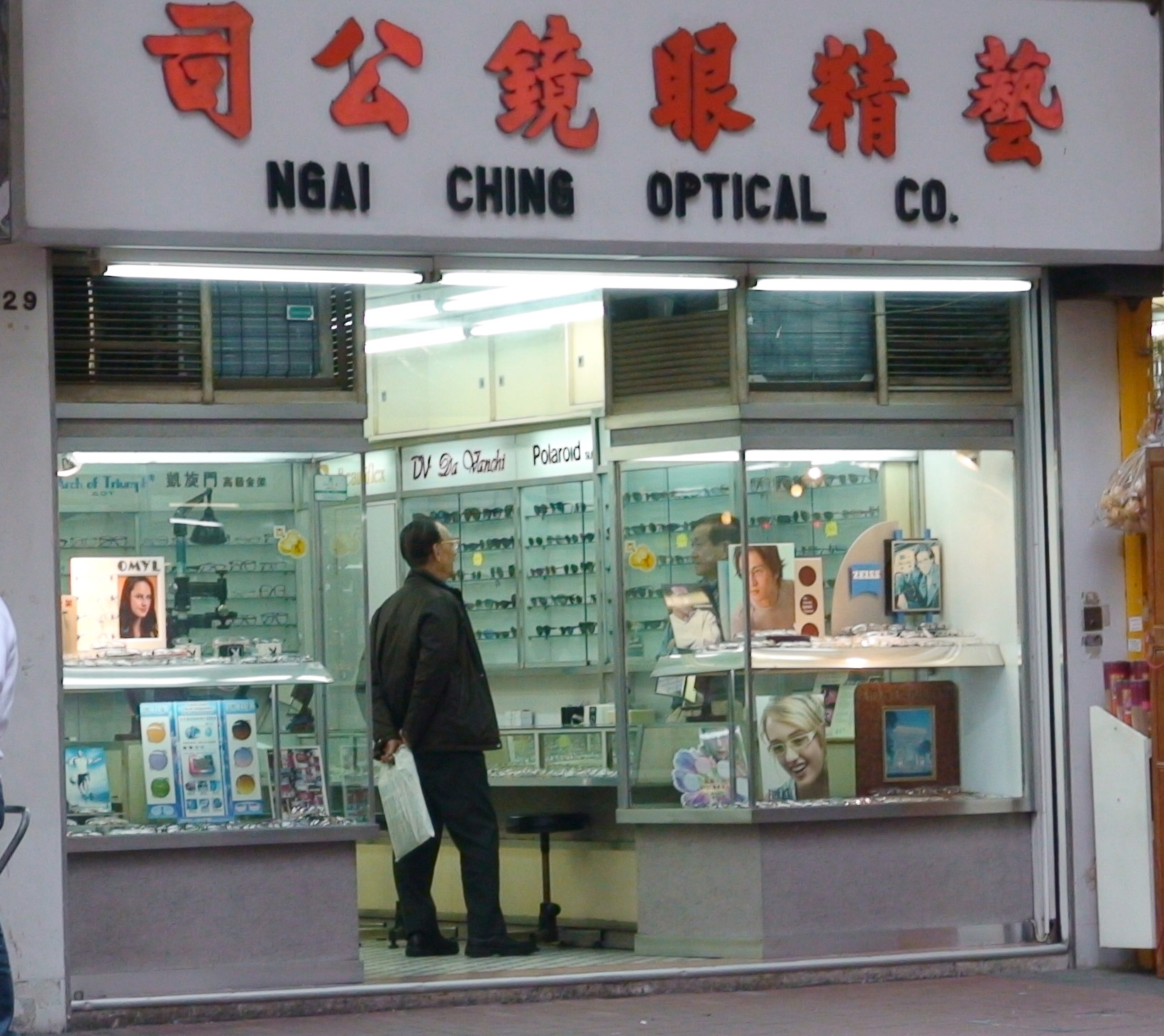 A Glass Shop (眼鏡鋪) in Yau Ma Tei , Hong Kong